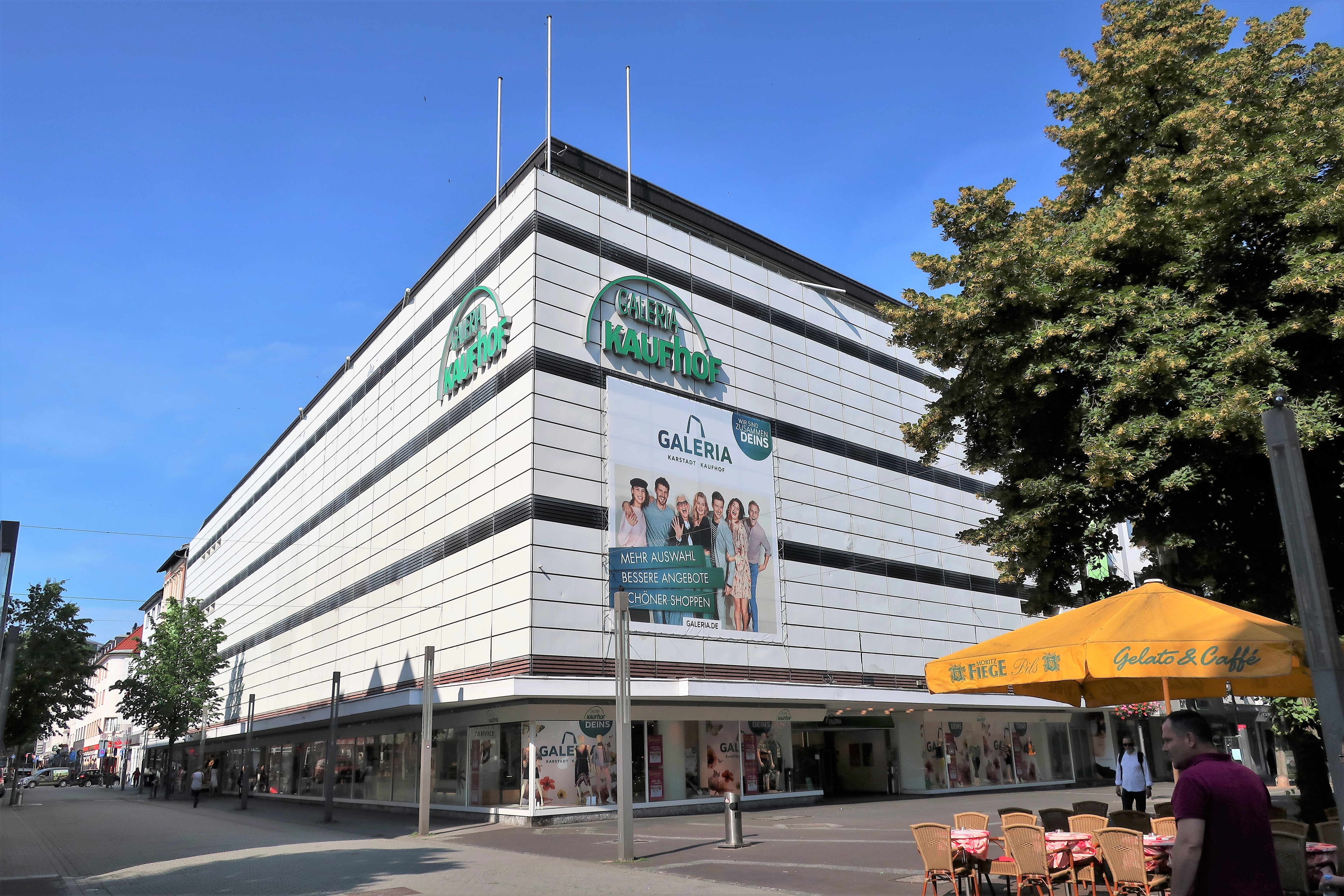 Warenhaus Galeria Kaufhof in Hagen, Elberfelder Straße 23-25 (re.) Ecke Kampstraße (l.).